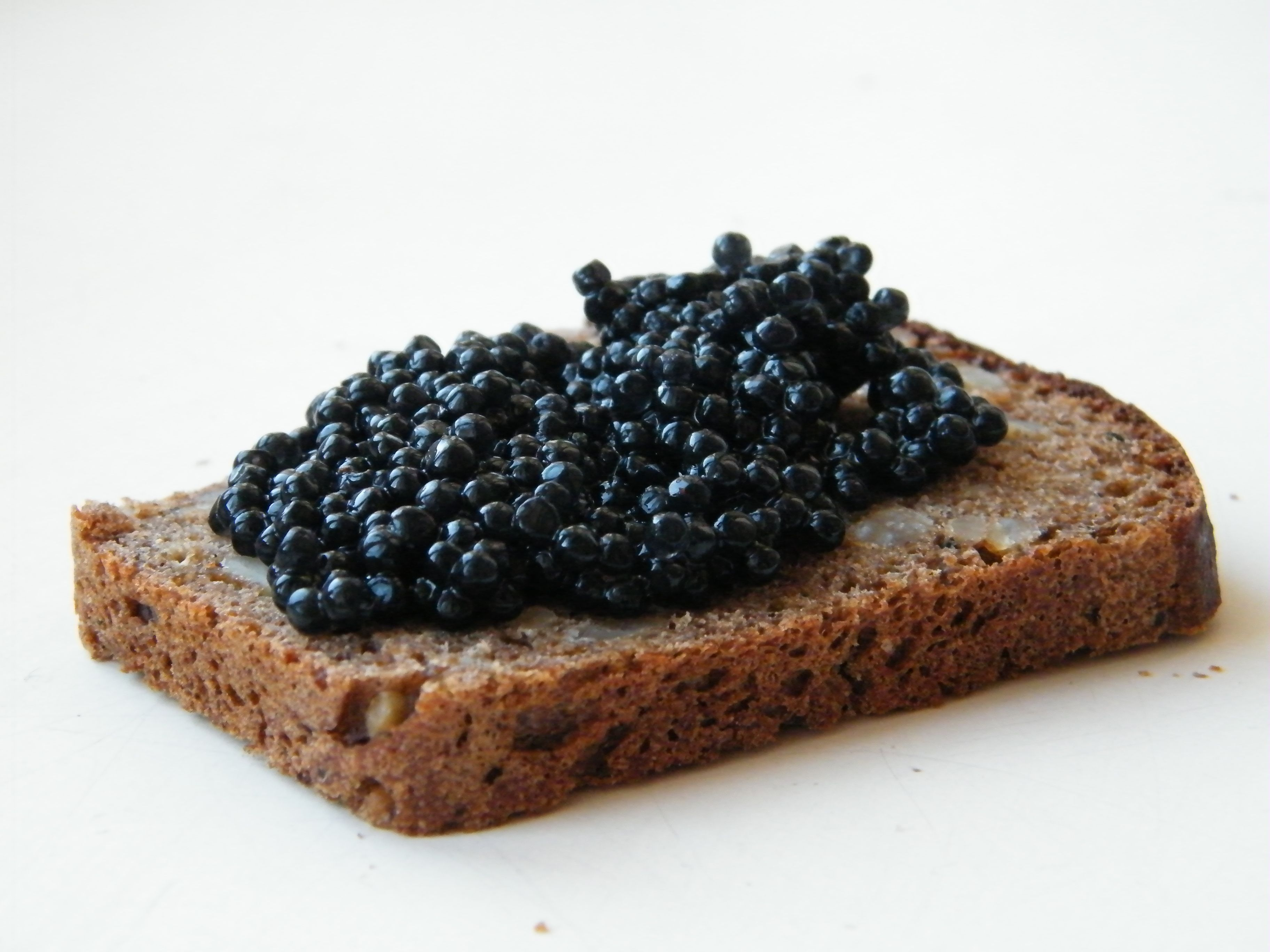 Искусственная черная икра